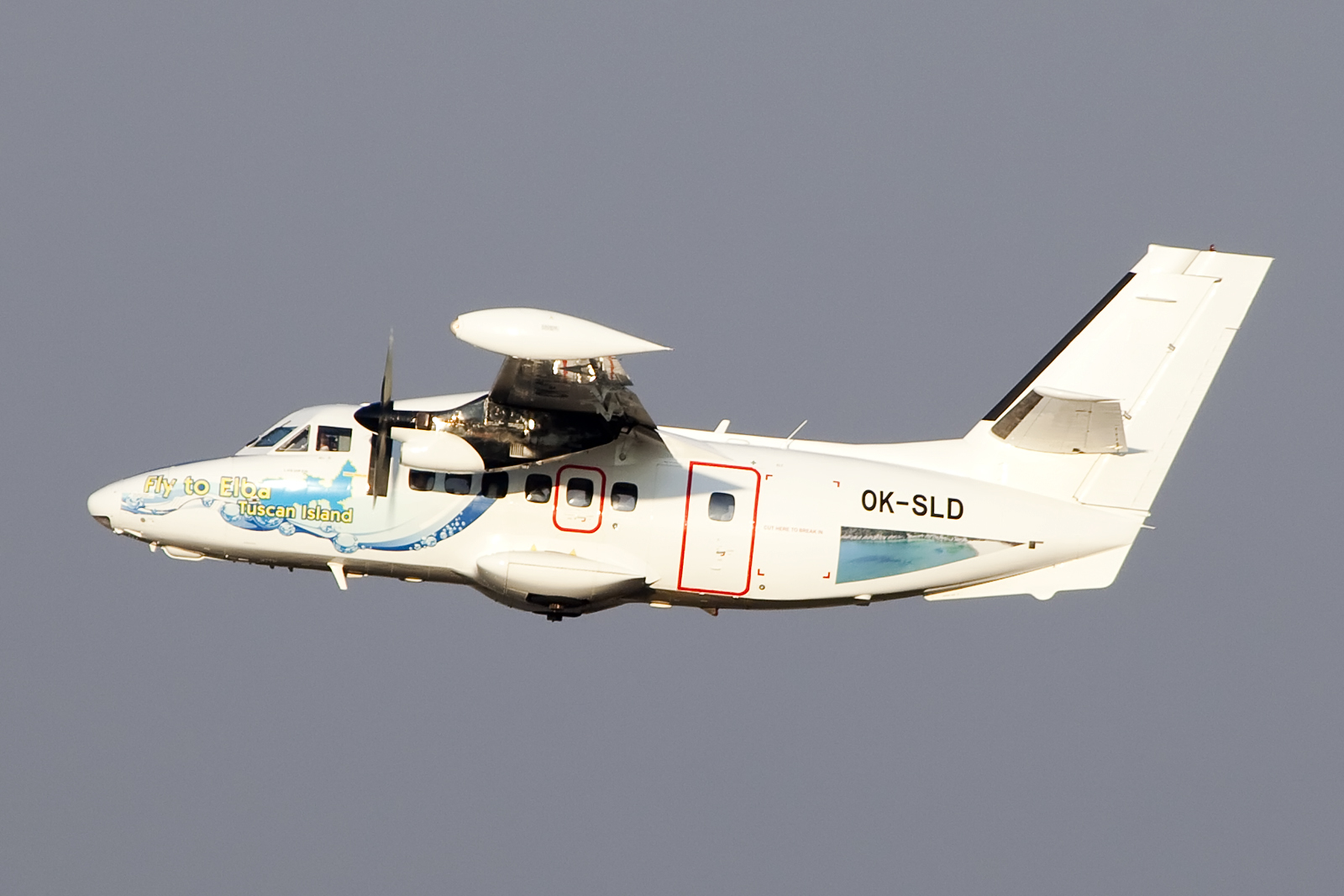 Milaan-Malpensa